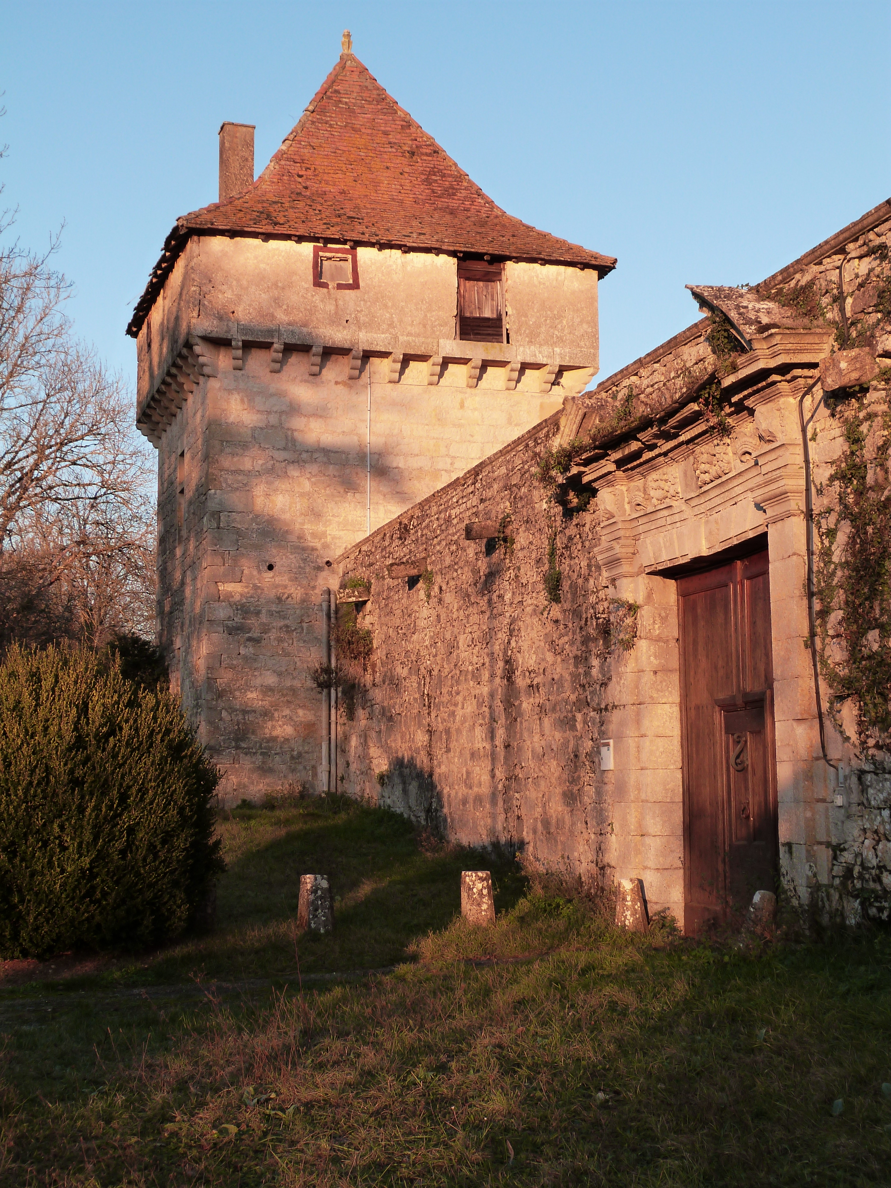 Château de Cornusson (Inscrit) .